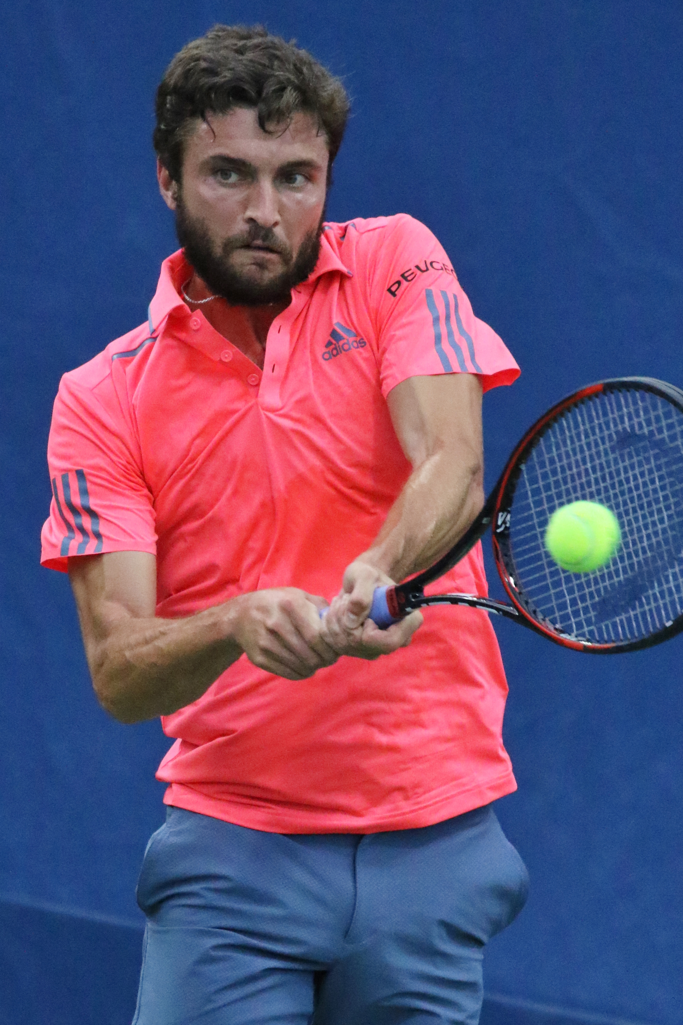 Simon US16 (44)